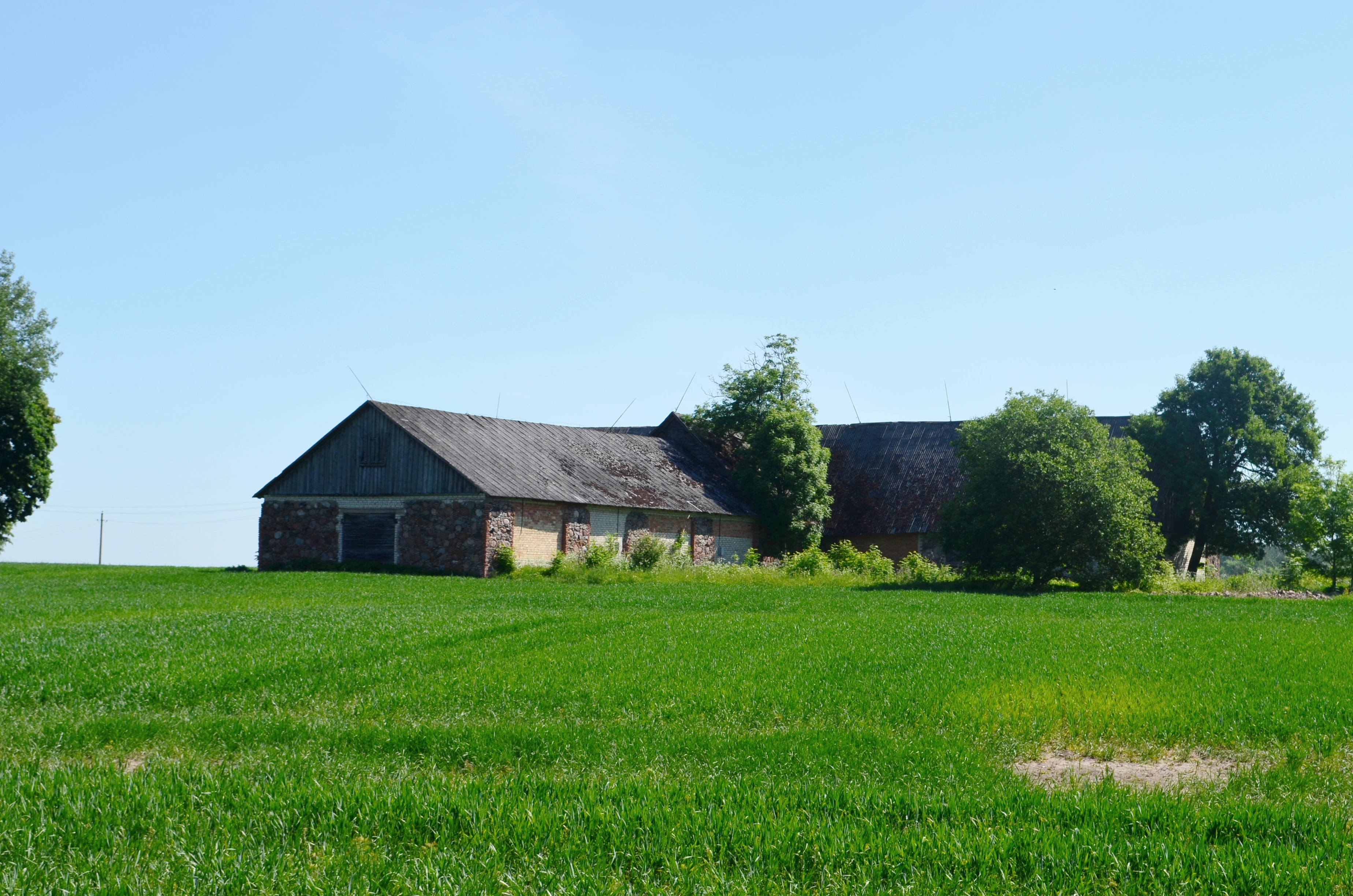 Kreivakiškis, Pakruojo raj.